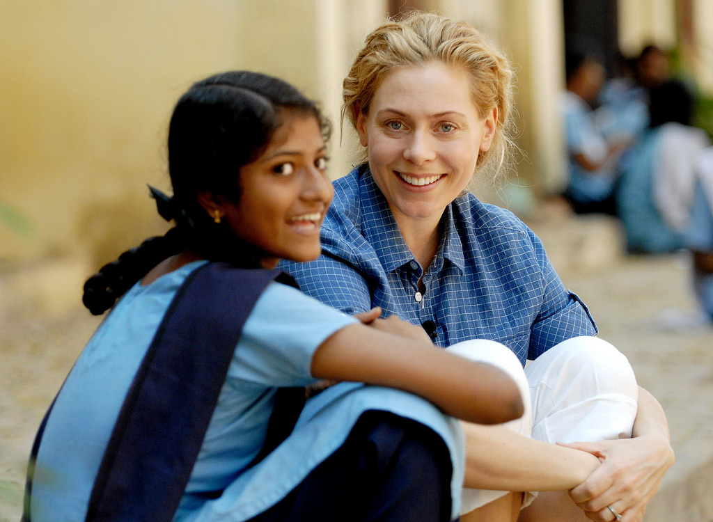 Eva Röse reste till Indien inför Humorgalan 2007.